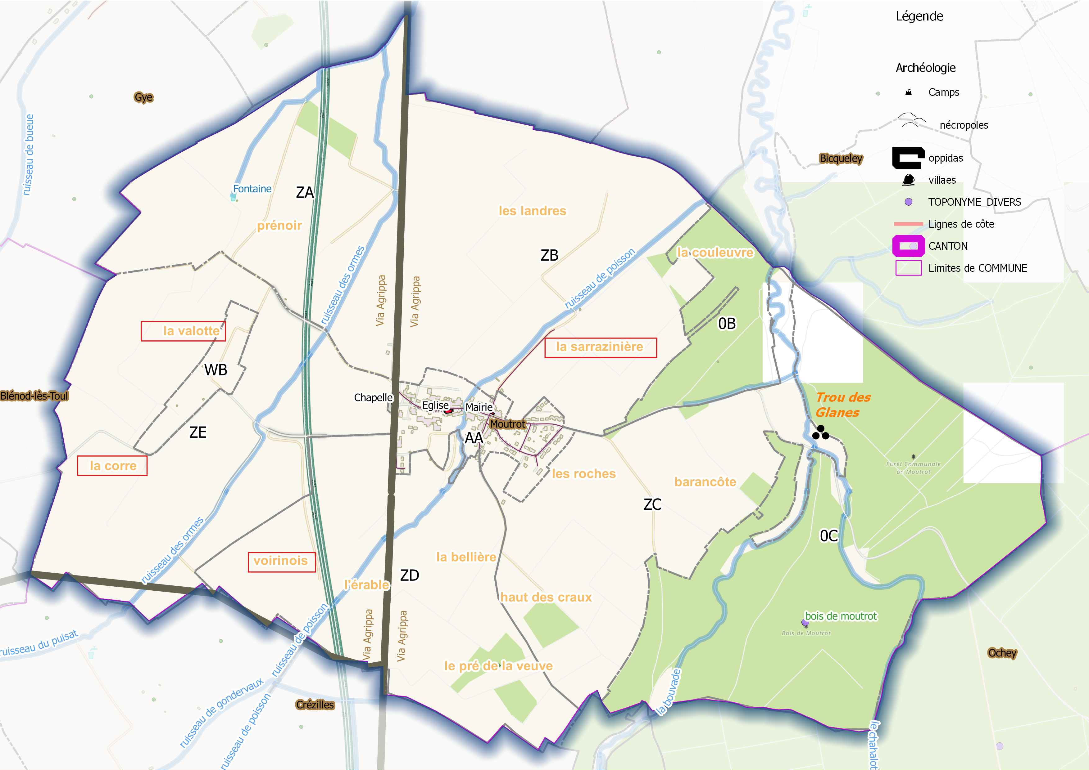 Moutrot (Ban communal) OSM et Qgis, mentions additionnelles